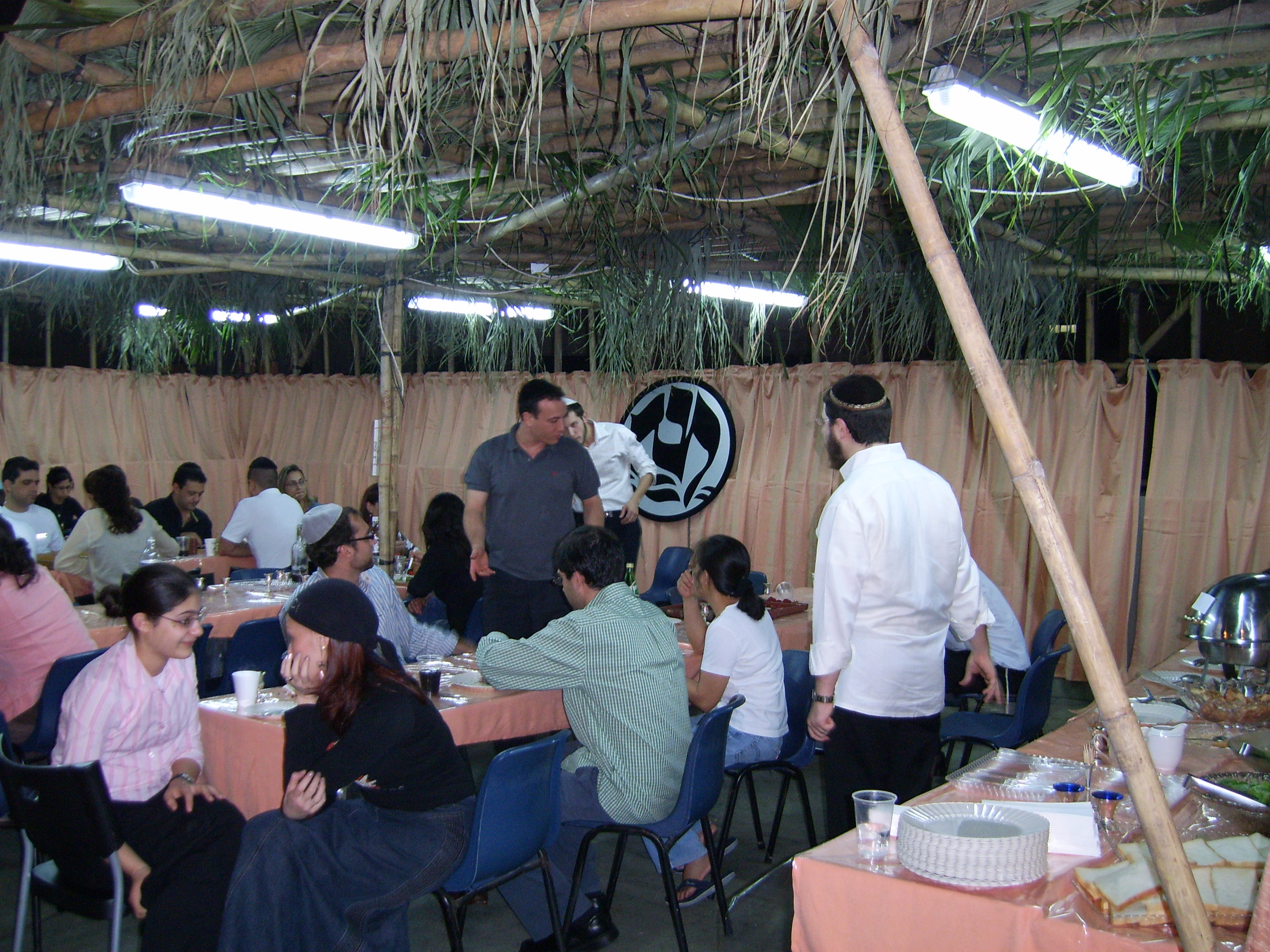 sukot in chabad of hong kong